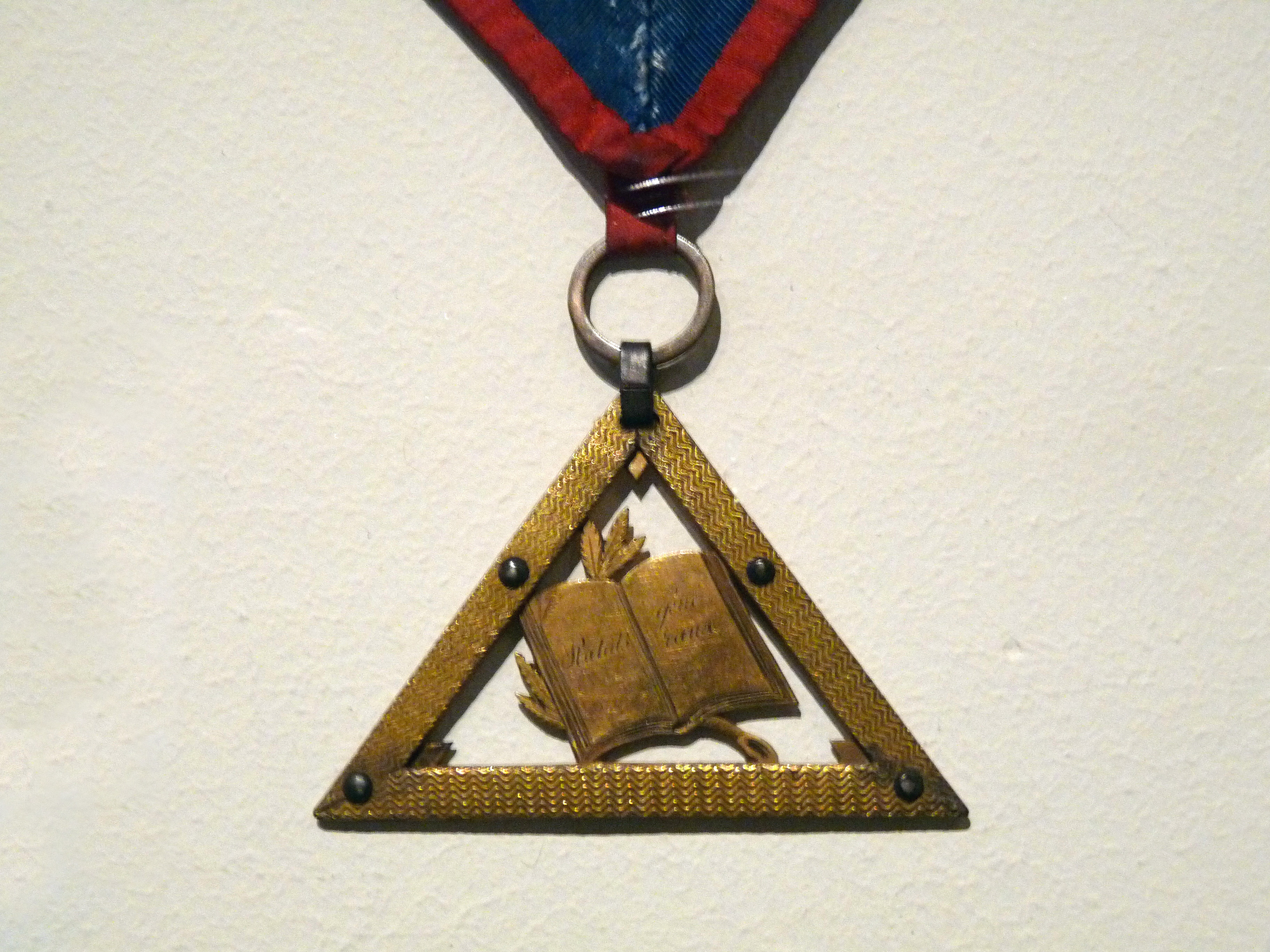 Franc-maçonnerie à Strasbourg : sautoir d'officier (de l'Orateur), bijou en métal doré en forme de triangle avec un livre, les Statuts généraux (Rite écossais ancien et accepté).